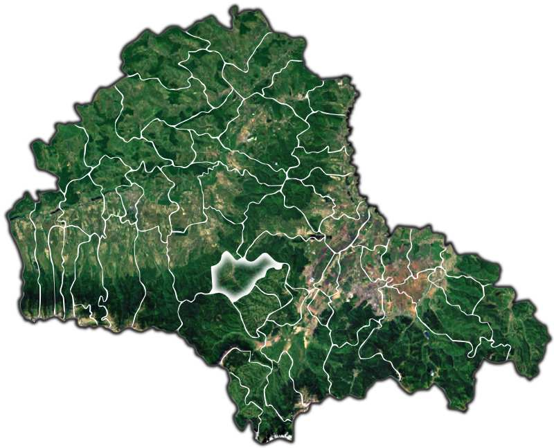 Sinca Noua jud Brasov